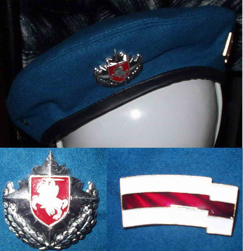 Берет ВДВ РБ